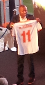 Presentació del jugador valencianista Dorlan Pabón